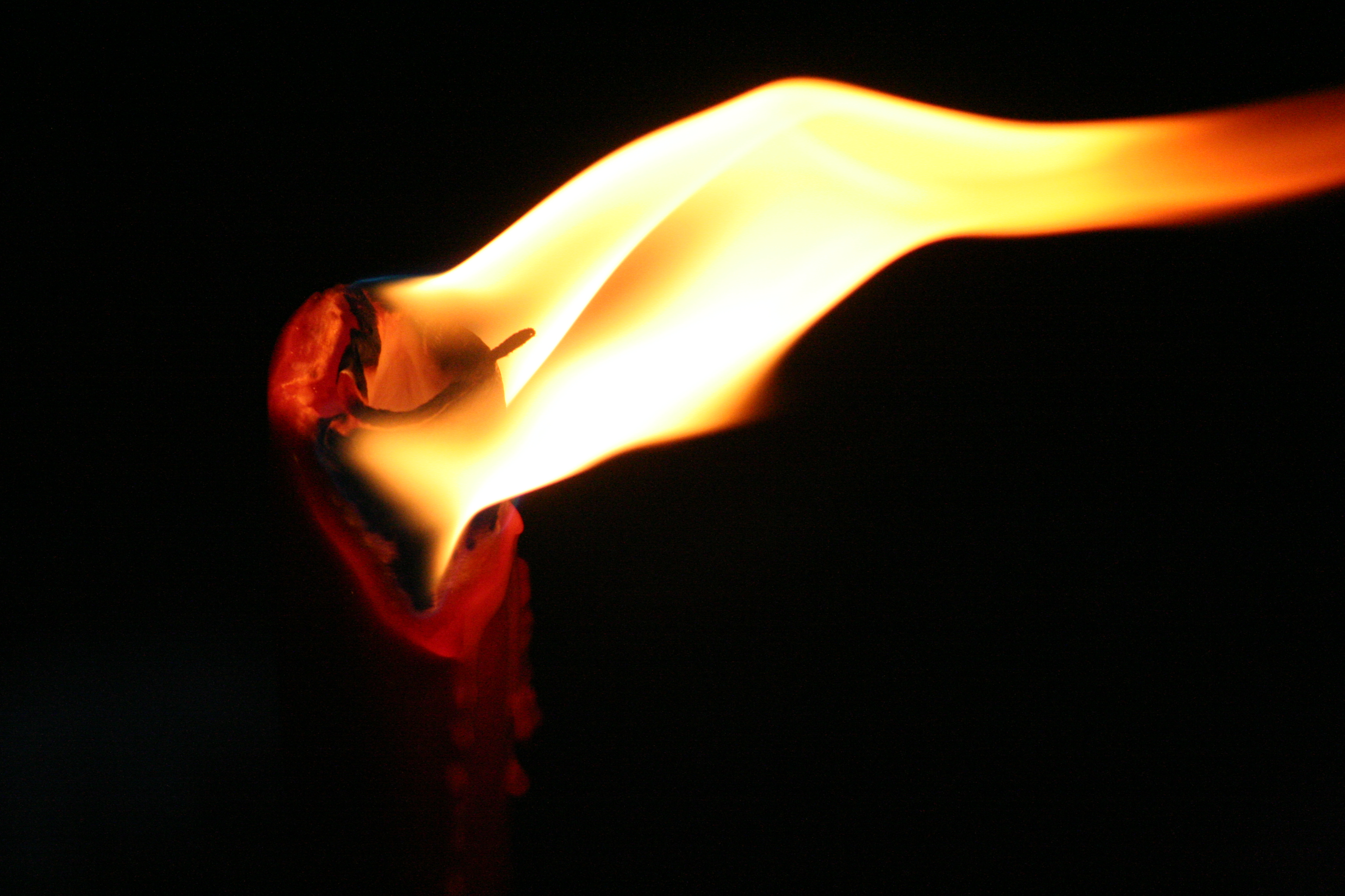 Brennende Fackel im Wind bei Nacht - Nr. 001 Burning torch in the wind at night - No. 001